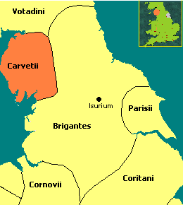 Mapa del territorio de los Carvetii